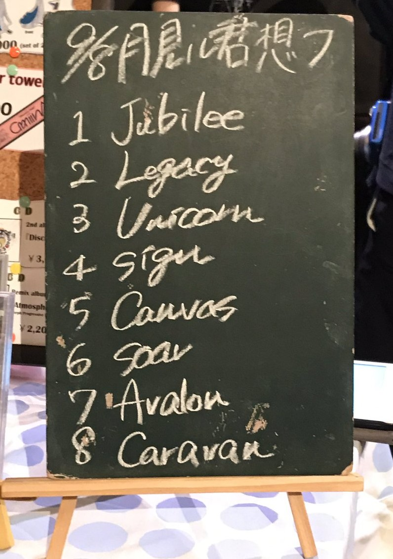 amiinAセトリボード